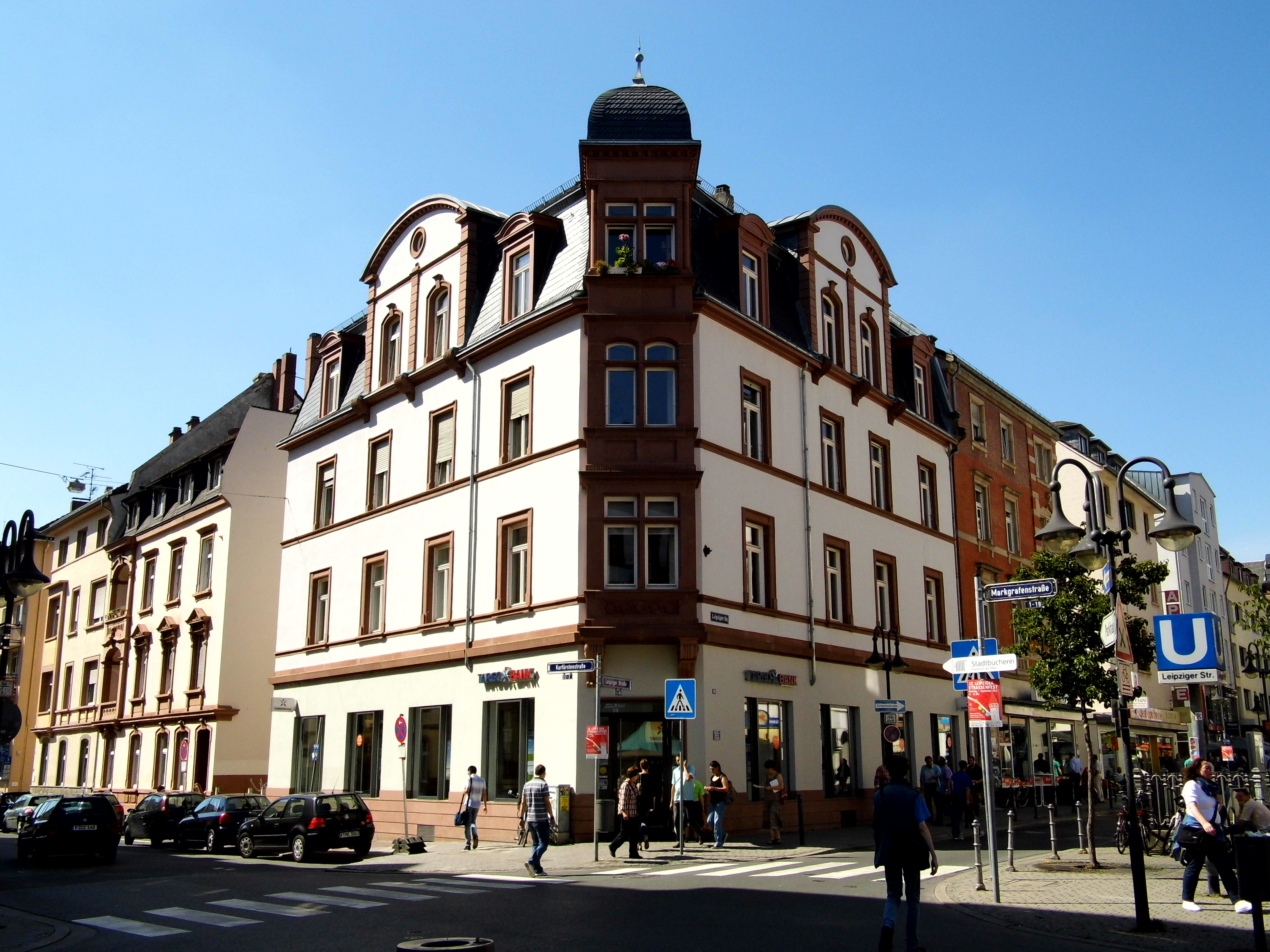 Frankfurt-Bockenheim, Leipziger Straße 53 Ecke Kurfürstenstraße 2. Denkmalgeschütztes Mietshaus um 1895 mit Eckbebauung. Putzfassade mit Neurenaissancedetails und turmartiger Eckbetonung mit markanter Dachgaube. Bauherr Kaufmann Carl Nawratzki, Eckladenmieter 1902 Warenhaus Nawratzki & Co. Bürsten-Manufaktur. Der Eigentümer Dr. jur. Arthur Nawratzki verlor mit der 5. Verordnung zum Reichsbürgergesetz vom 30. November 1939, wie alle noch tätigen jüdischen Anwälte, seine Zulassung. Er verkaufte 1939 diese Immobilie an Emil Schwab. Die Unterlagen liegen im ISG Frankfurt am Main, das auch ein Photo des Hauses vom 11.10.1910 anläßlich des Margeritentages aufbewahrt (Reproabzug einer Zeitungsillustration ISG Bestandskürzel S7Z1910). Später wurde im Erdgeschoß eine Filiale der Stadtsparkasse Frankfurt am Main eingerichtet, wobei, trotz Denkmalschutz, das Erdgeschoß einschließlich des Eingangsportals modernisiert wurde. Diese Zweigstelle wurde mit der Fusion der Frankfurter Sparkassen später geschlossen. Laut Notiz des ISG wurde am 13.11.1984 ein 44jähriger Geophysiker in einer Wohnung dieses Hauses erdrosselt aufgefunden. Der Mord wurde nie aufgeklärt. Nach erneuter aufwendiger Sanierung des Hauses befindet sich dort im Erdgeschoß derzeit eine Filiale der Targobank. Bereits seit 1902 besteht die Gebäudenachbarschaft mit dem bis heute dort ansässigem Lebensmitteleinzelhandel Fischhaus Bader.